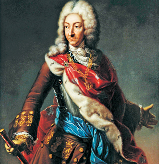 cropped